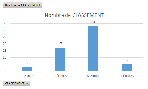 Répartition d’Hébergements labellisés sur le département 54